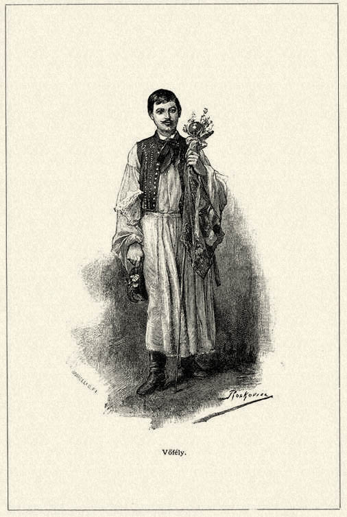 Vőfély